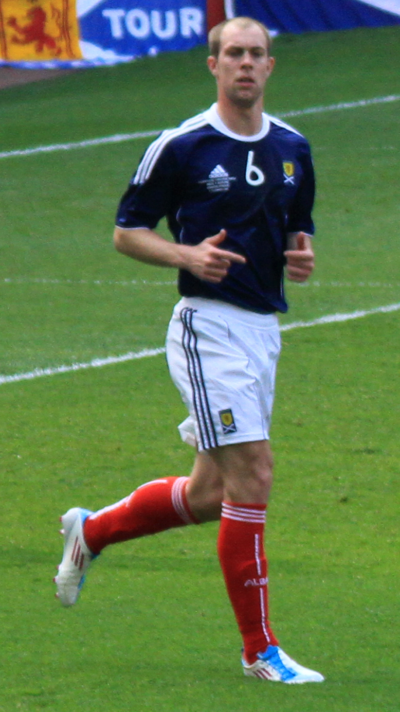 Steven Whittaker